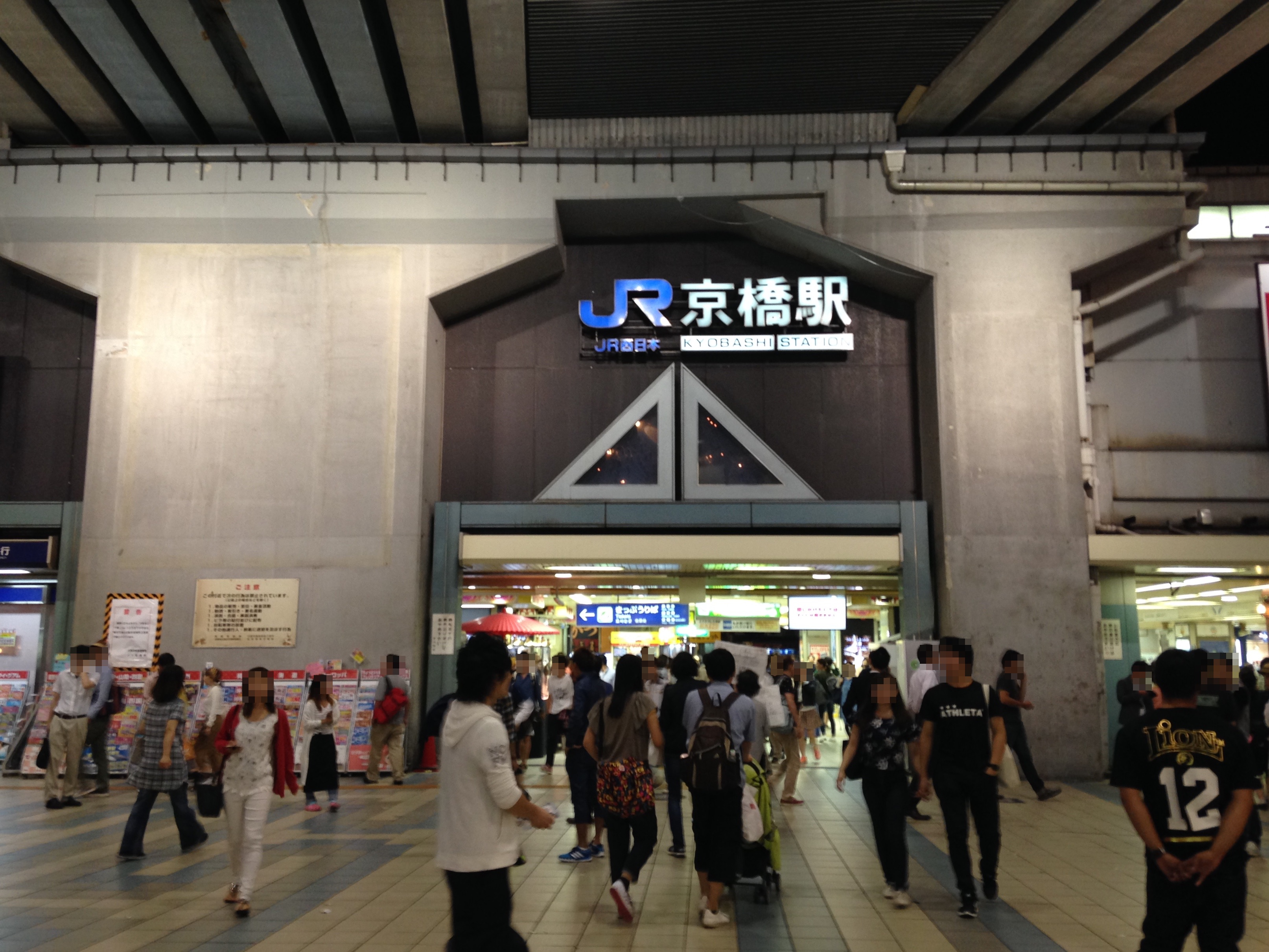 JR京橋駅